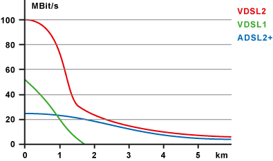 Grafiek snelheid DSL in functie van afstand in kilometer